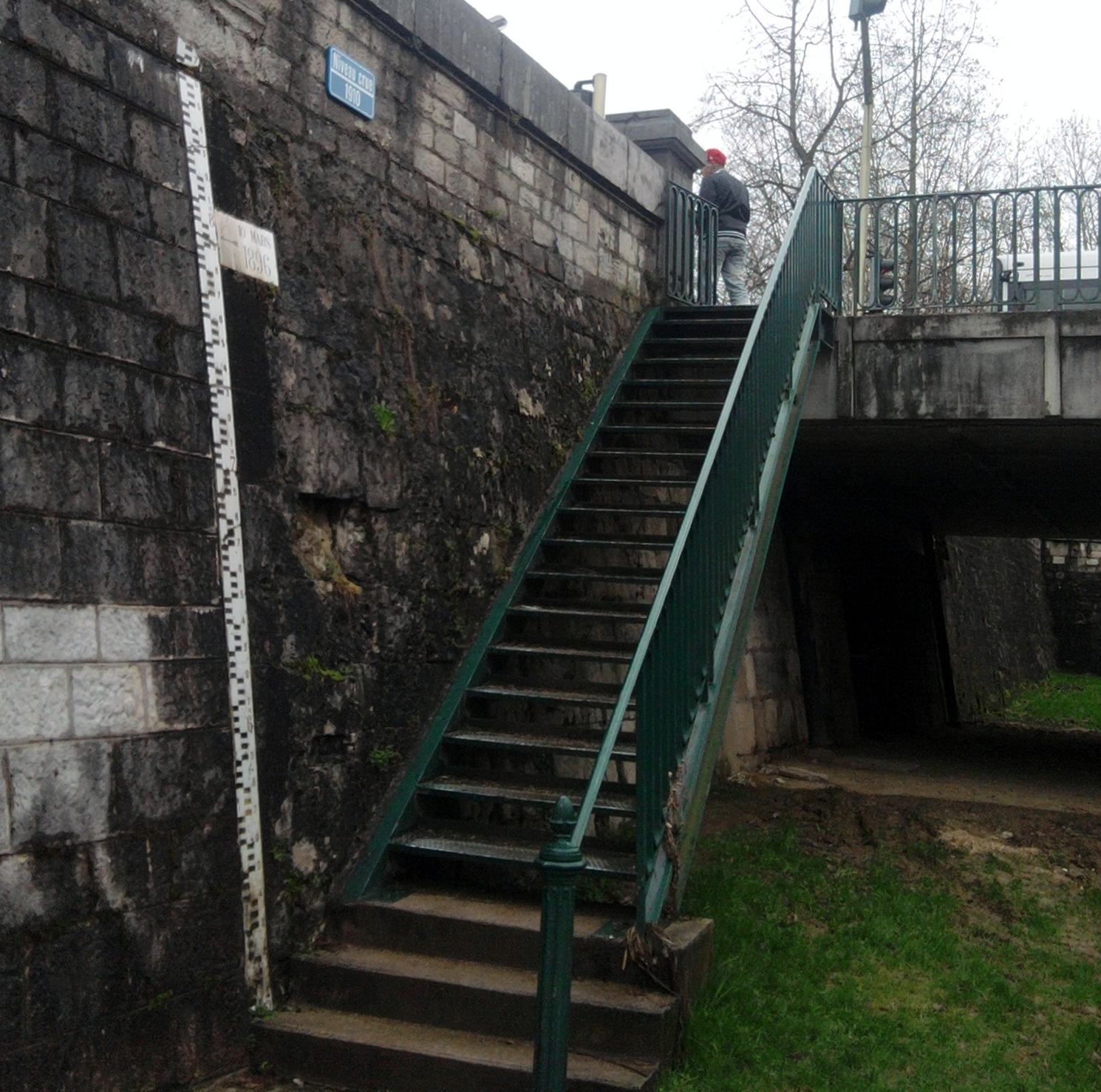 Témoin de crue au niveau du pont de la République, à Besançon (Doubs, France).